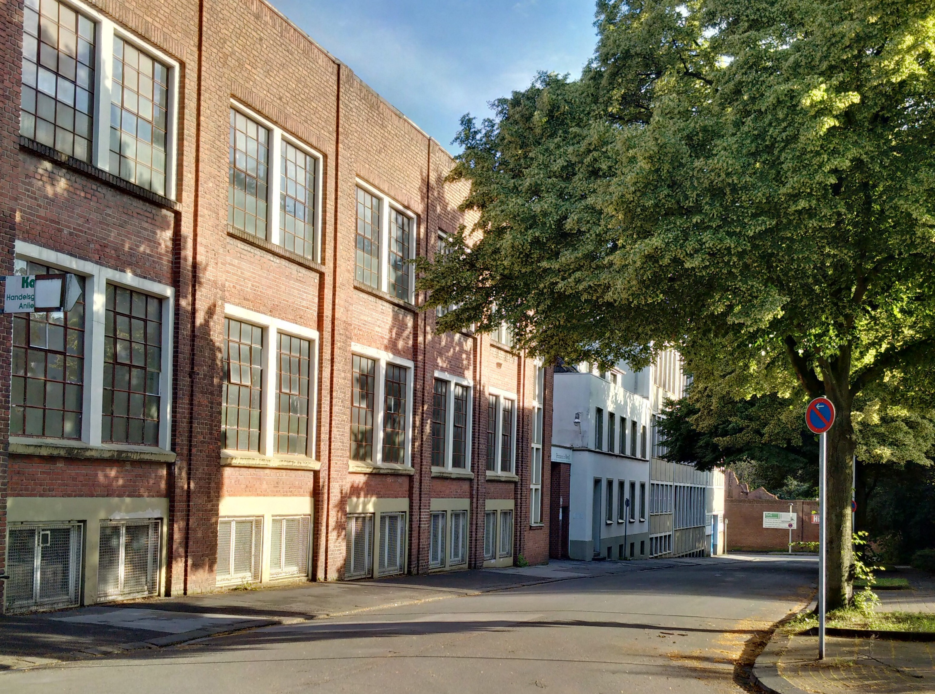 Industriegebiet Solingen-Wald, Georgestraße, aufgenommen im Sommer 2016